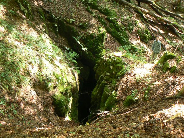 Kostnica. Jedna z najstarších známych jaskýň na slovenskej strane planiny Dolný vrch/Alsó-hegy. Sondovaním v úrovni pôvodného dna prenikli pražskí jaskyniari do dovtedy neznámych priestorov s hĺbkou 35 m. Polygónová dĺžka jaskyne predstavuje 47 m.